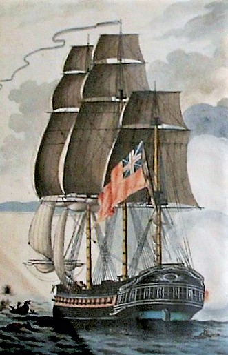 Prospekt of slaget ved Alvøen 1807